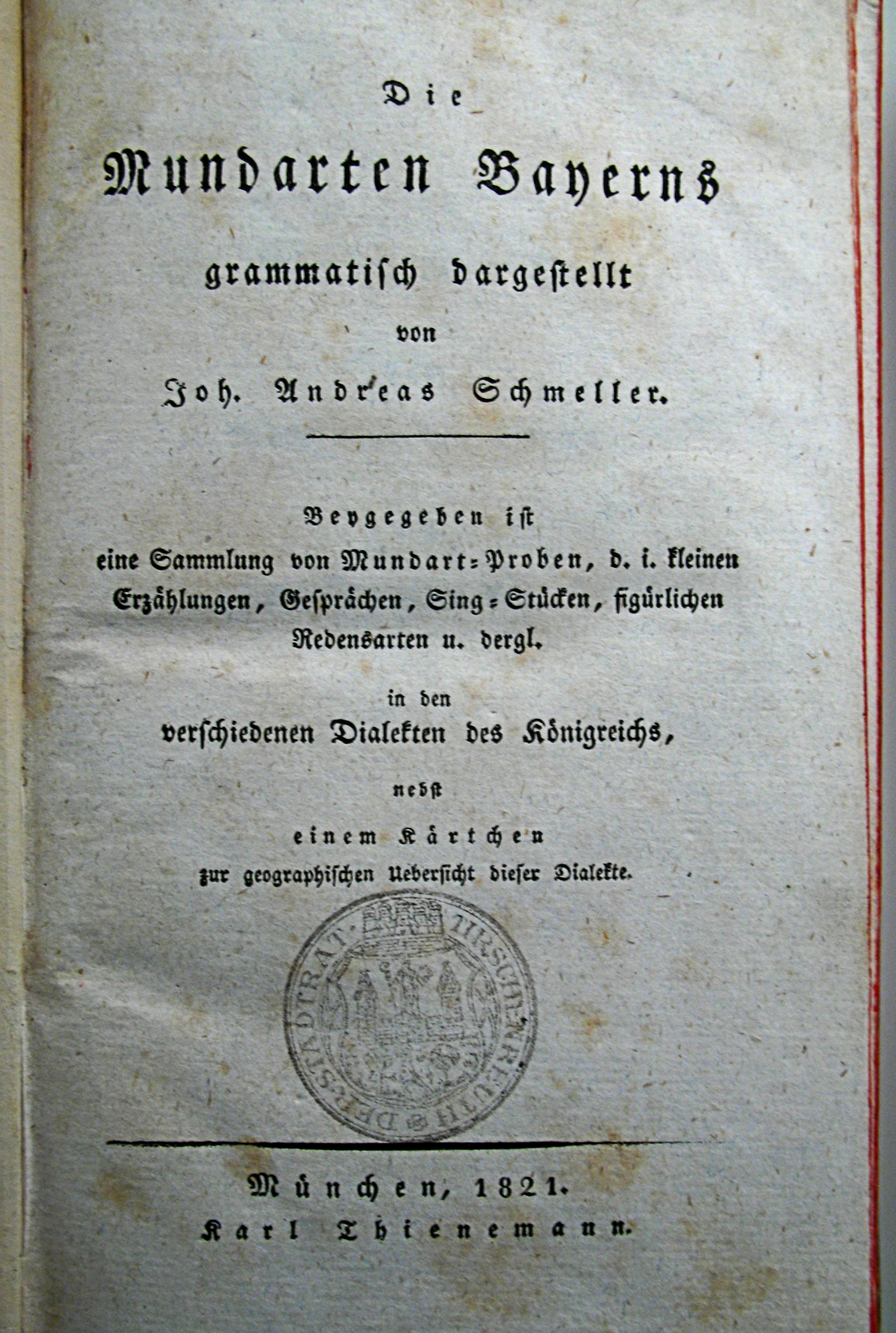 Deutschland, Oberpfalz, Tirschenreuth, Museum, Johann Andreas Schmeller, "Die Mundarten Bayerns" von 1821, Titelseite